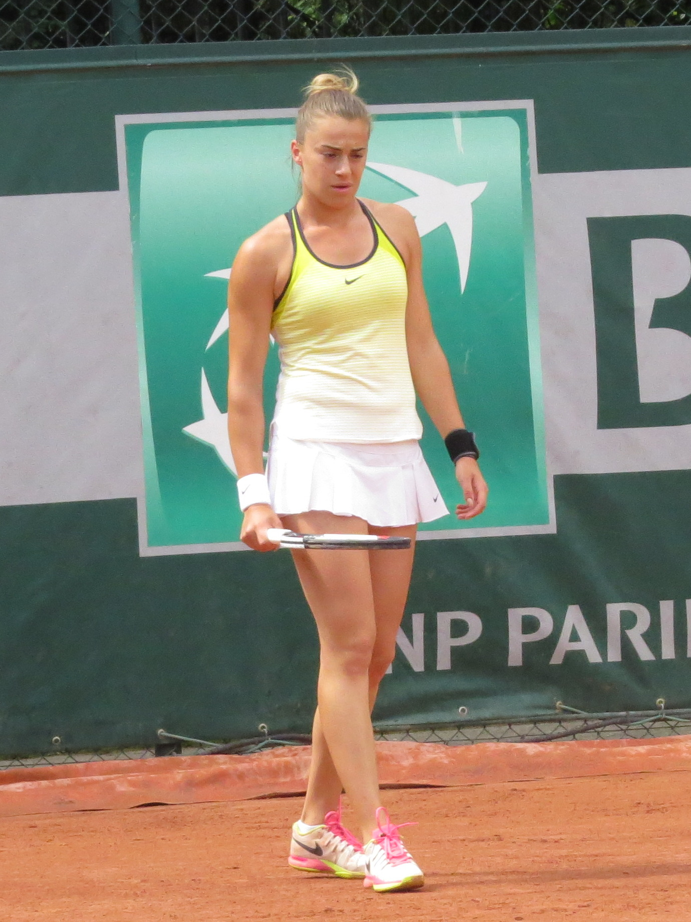 Lina Gjorcheska lors de son premier tour des qualifications face à Quirine Lemoine (court n°12)